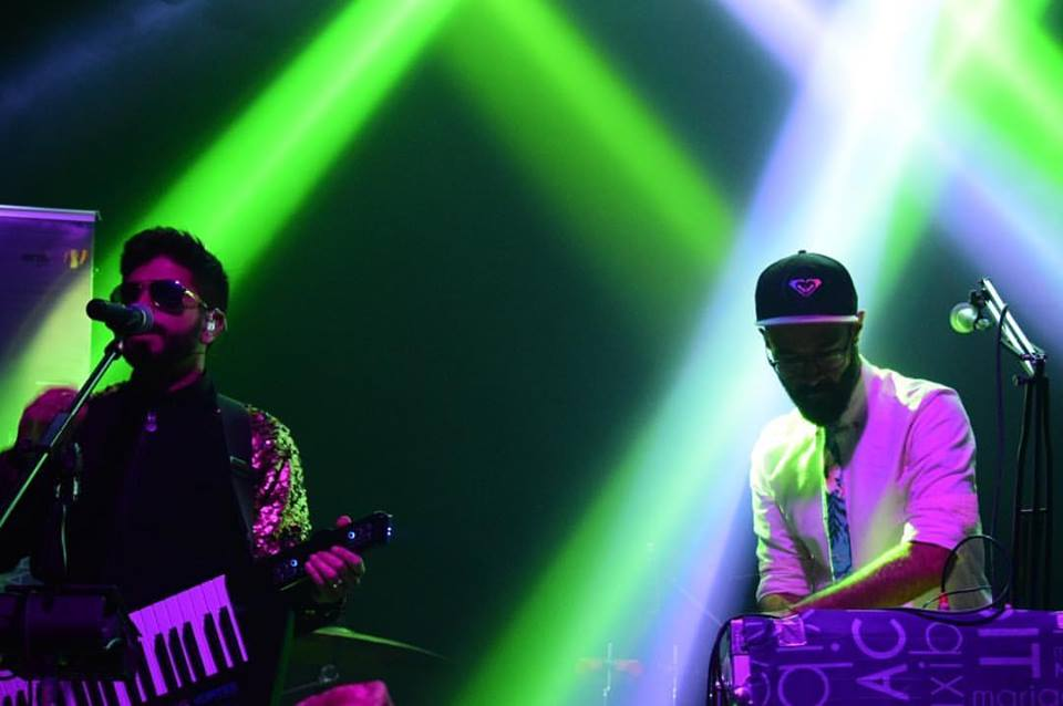 Foto por gingerbizarro #arturotorres el 7 de julio de 2017 en el foro indie rocks